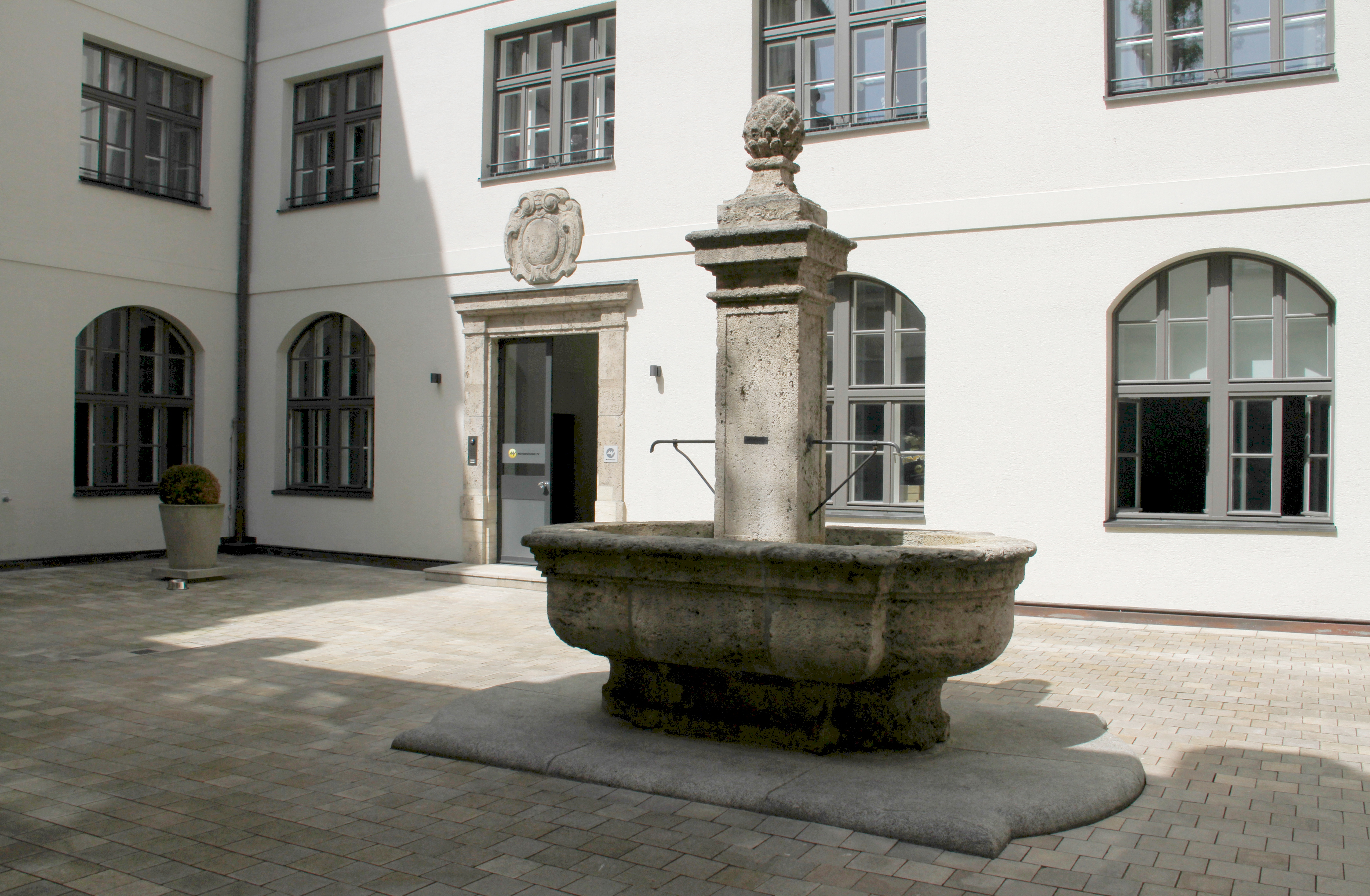 Thalkirchner Straße 54-60, München. Ehemaliges städtisches Arbeitsamt, errichtet 1912/13 von Hans Grässel. Umgebaut als Wohngebäude durch Phillip Starck. Brunnen im Innenhof